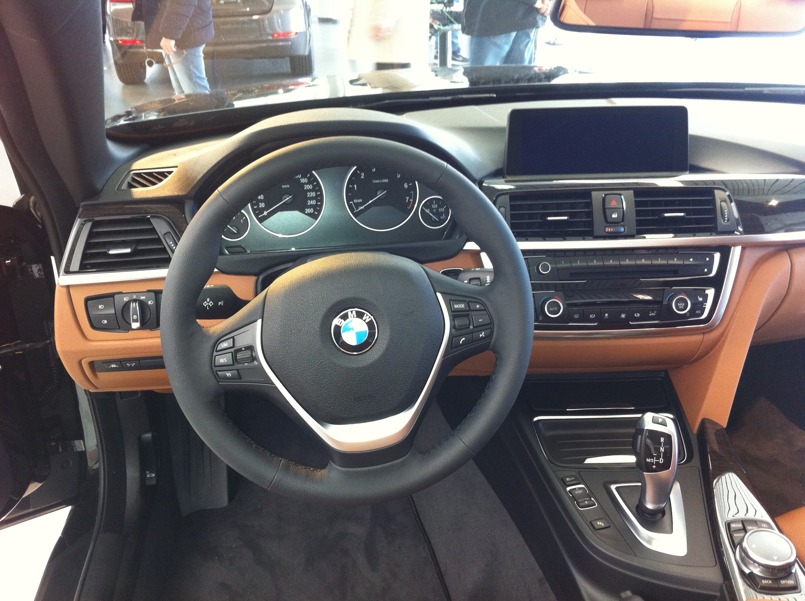 Cockpitansicht BMW 428i Cabrio